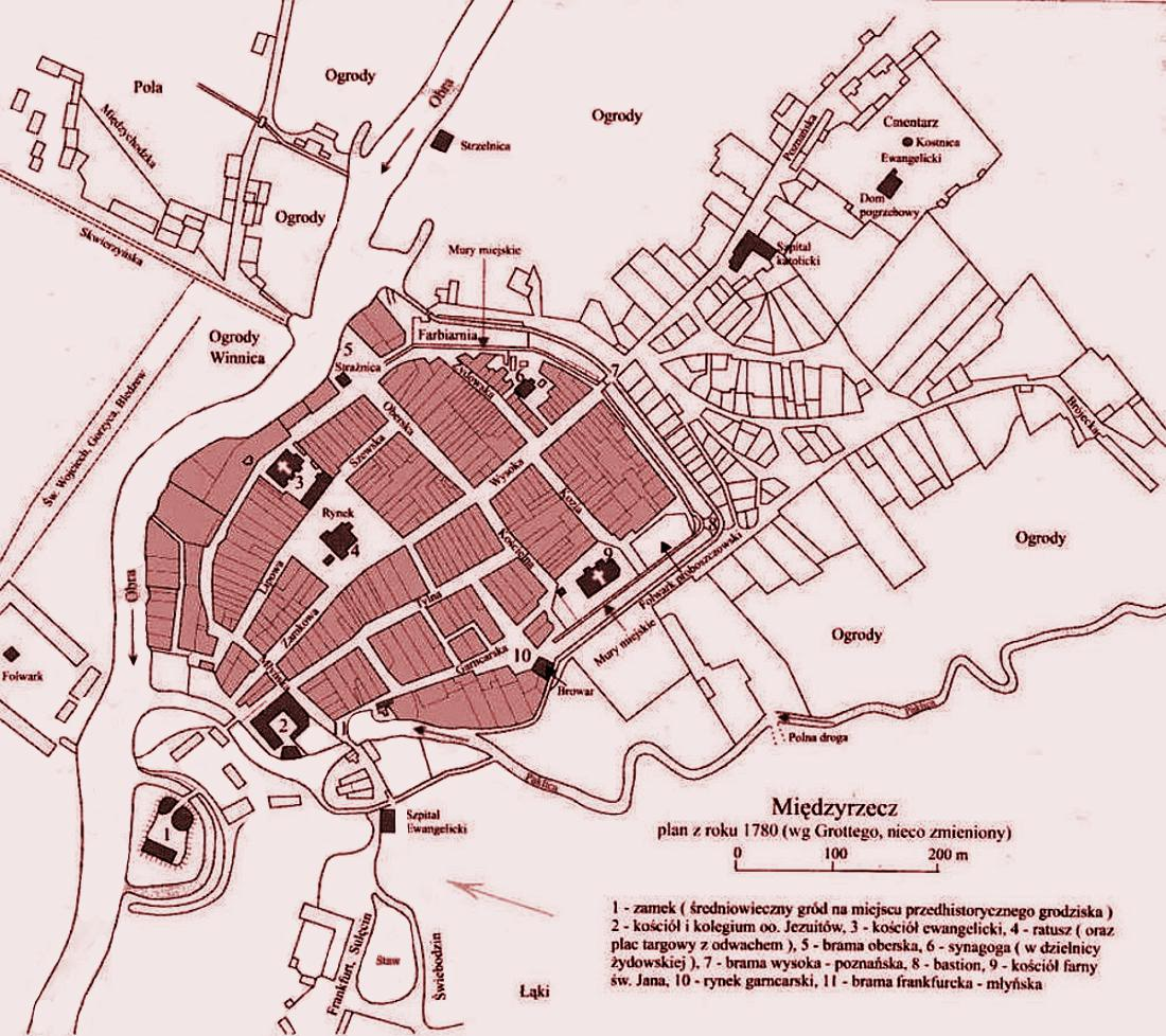 Plan Międzyrzecza z 1780 roku (zmieniony)